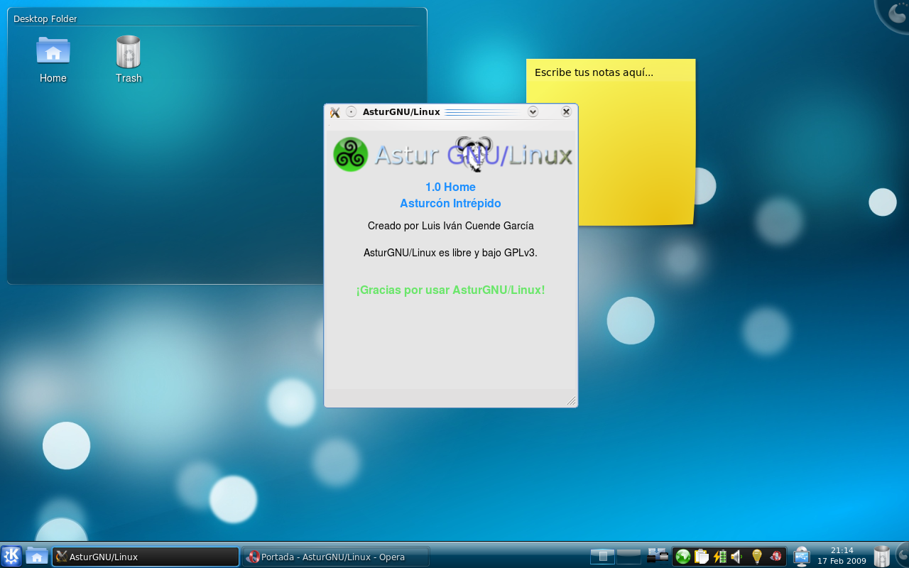 Pantallazo de AsturGNU/Linux Home